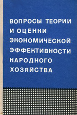 Кнiга Ф.С.Марцінкевіча